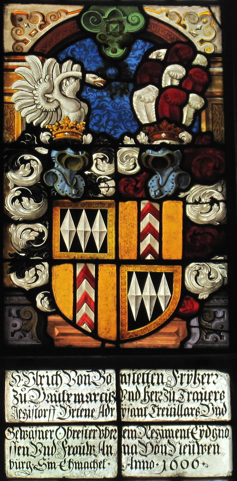 Kirche Jegenstorf, Wappenscheibe Johann Ulrich von Bonstetten (1548-1607) und Anne de Neuchâtel (1564-1625).